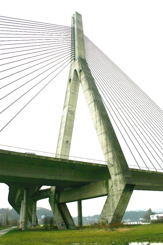 Pont Père Pire Pylone.